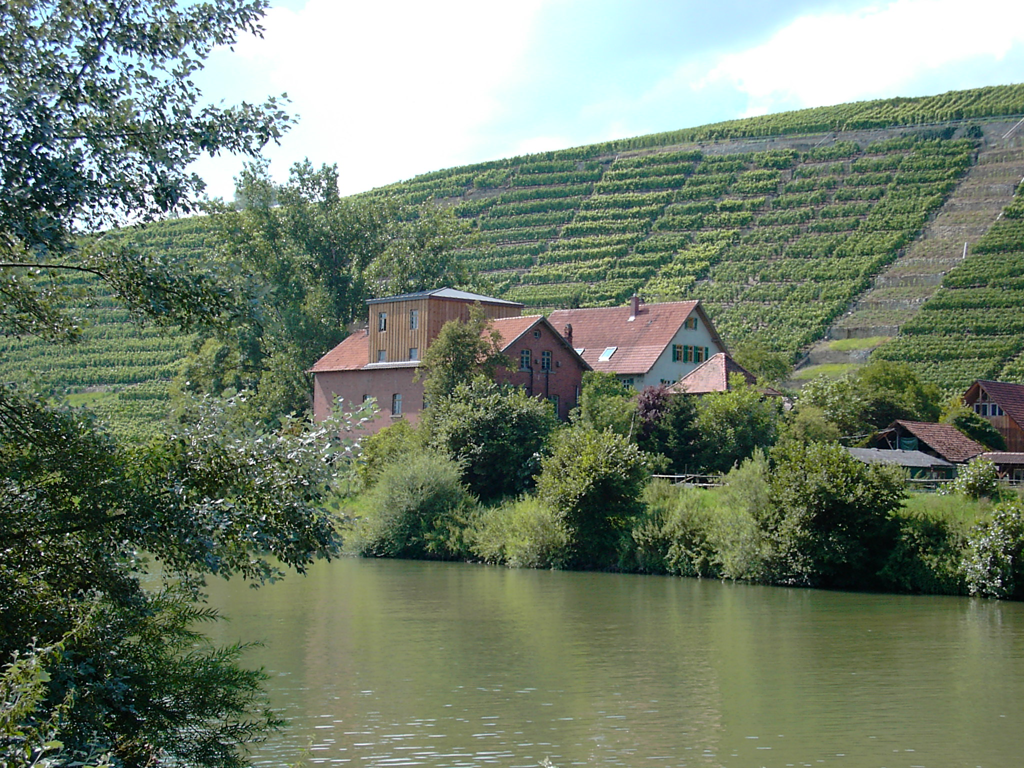 Kleiningersheimer Mühle